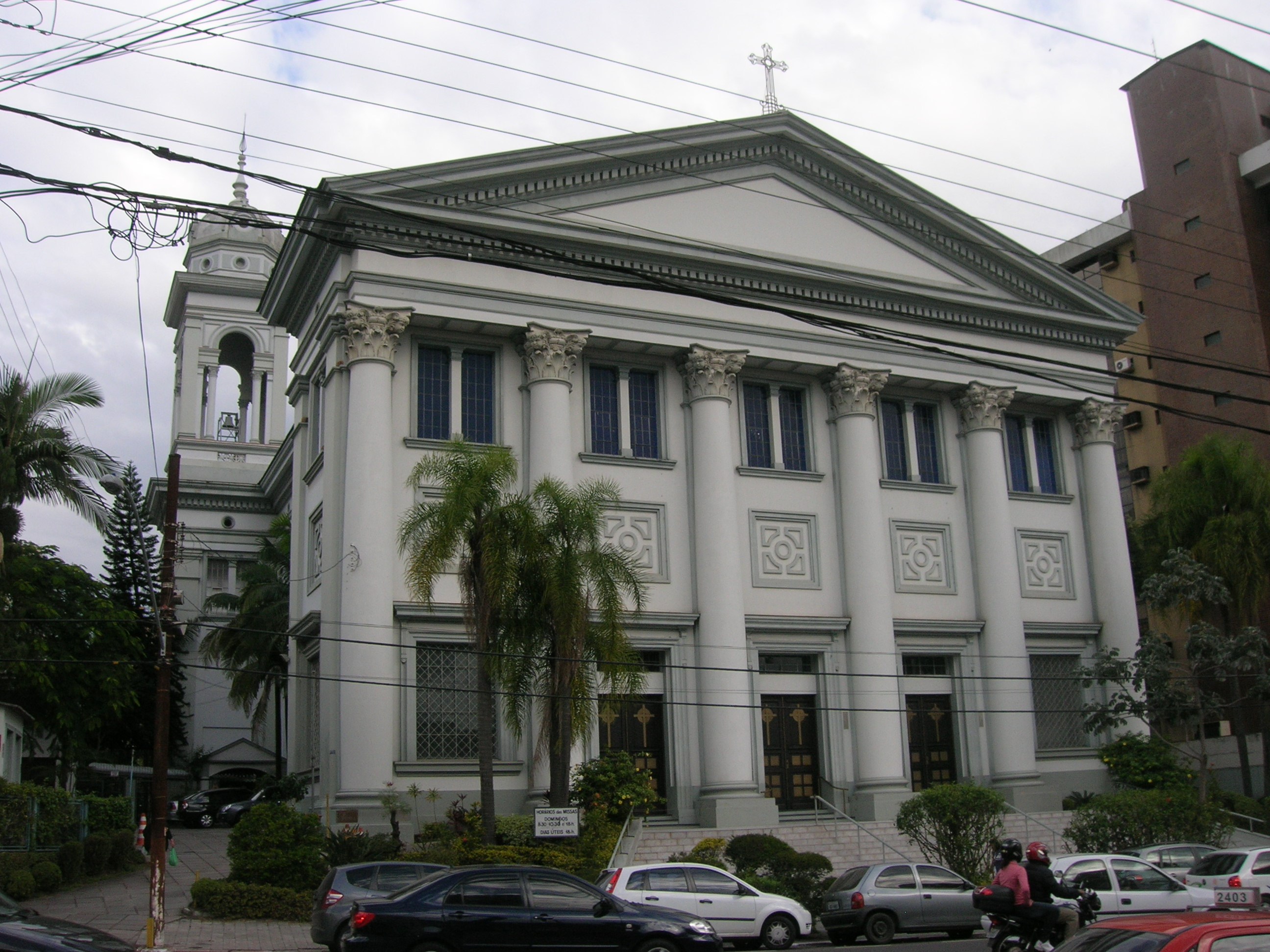 A Paróquia Nossa Senhora Auxiliadora, em Porto Alegre, RS, Brasil.